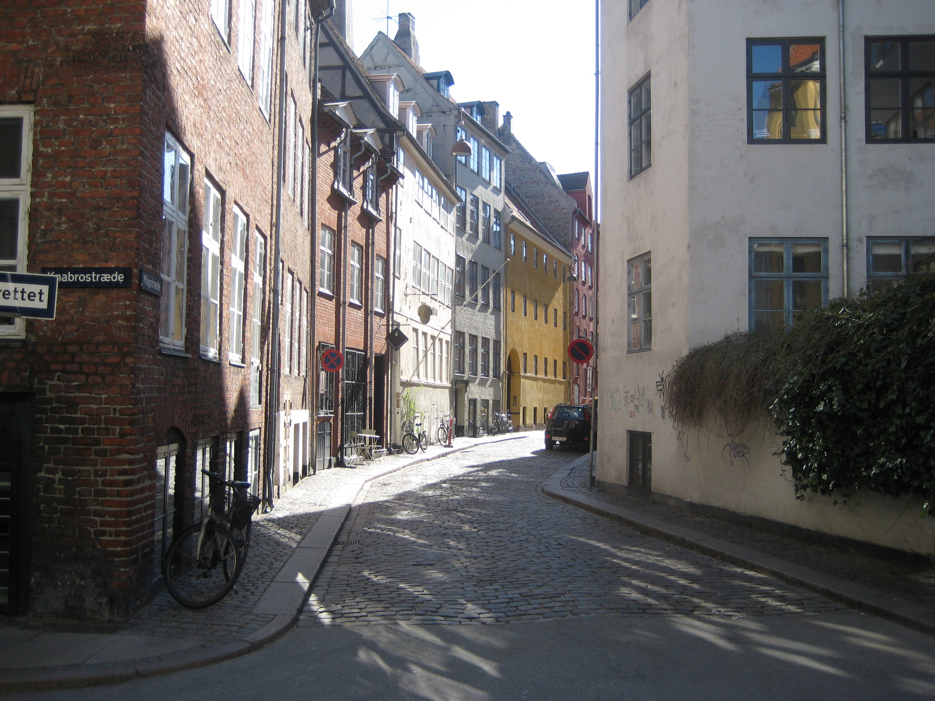 Magstræde in central Copenhagen, Denmark